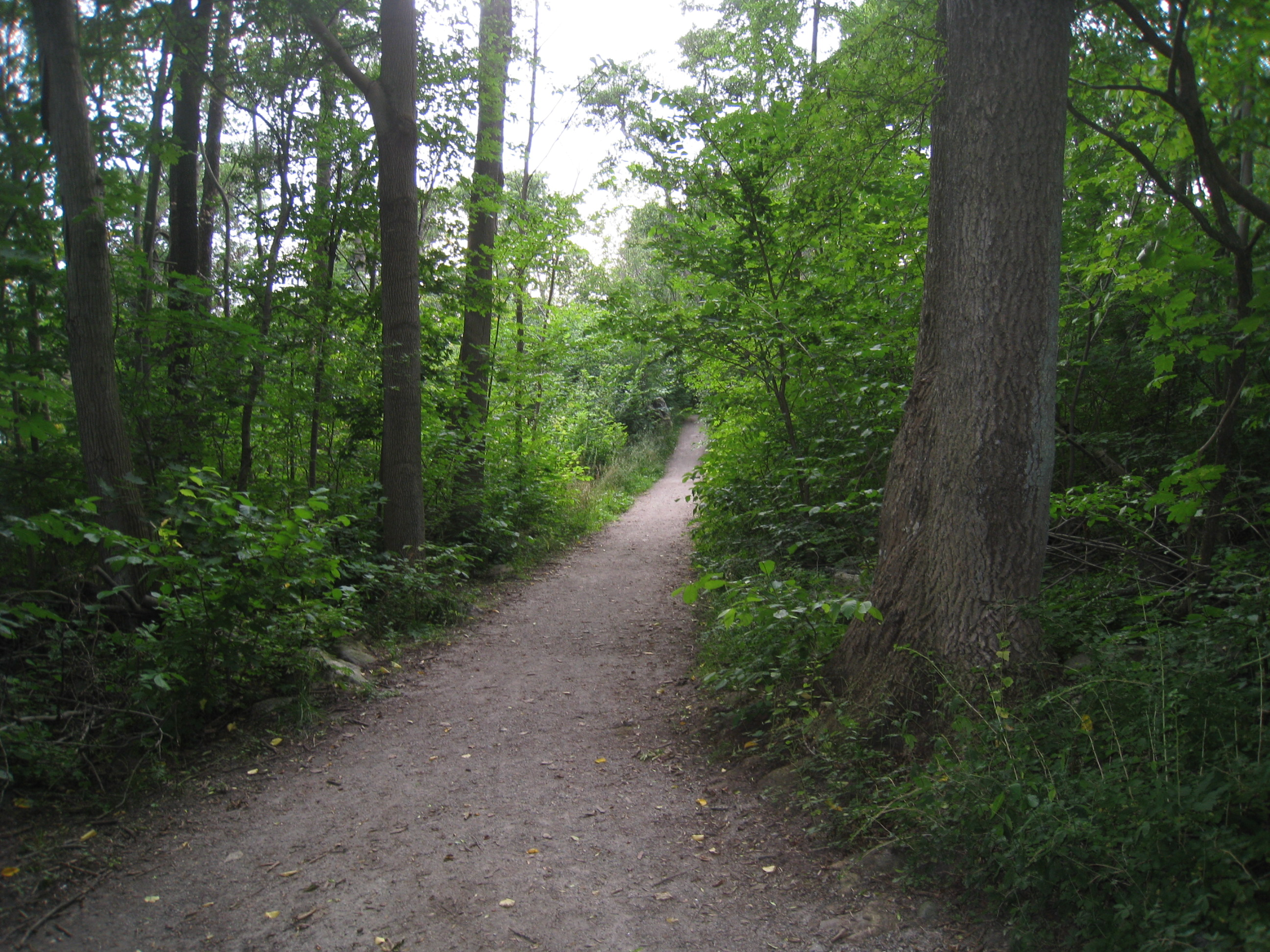 Ålstensparkens natur vid Mälaren i stadsdelen Ålsten i södra Bromma väster om Stockholm.